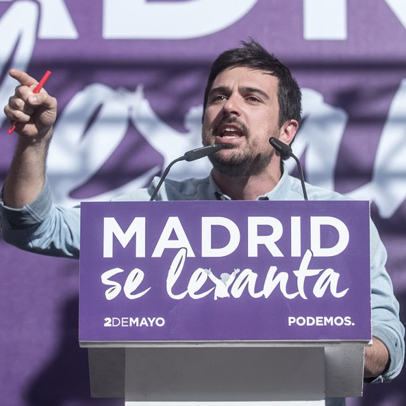 Ramón Espinar en 2017